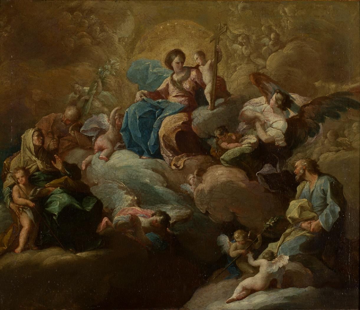 La obra representa a la Sagrada Familia en Gloria acompañados por San Juanito, San Zacarías y Santa Isabel, así como de varios ángeles y querubínes.